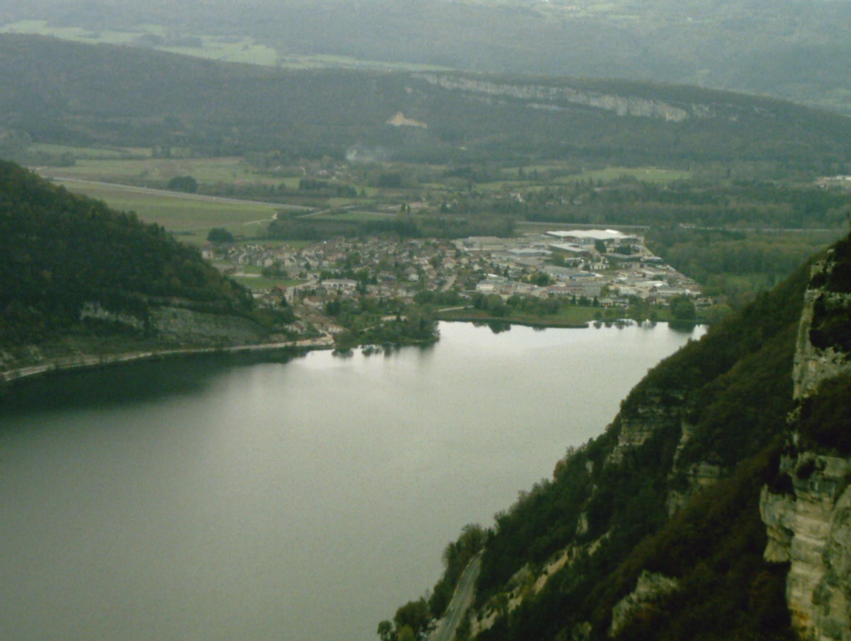 Vue générale de la commune de Port. Photo prise depuis "la Colonne" au dessus de Nantua.